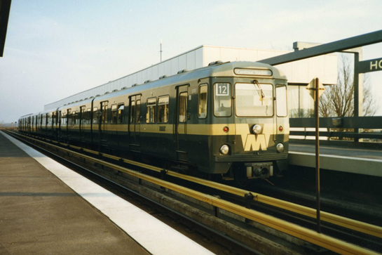 Metrotype MG2 op metrostation Hoogvliet